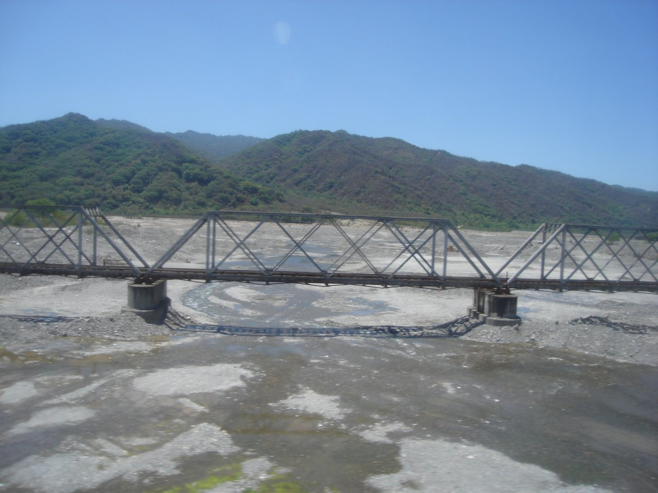 Puente del Ferrocarril General Manuel Belgrano sobre el Río Yala en la Provincia de Jujuy, Argentina.